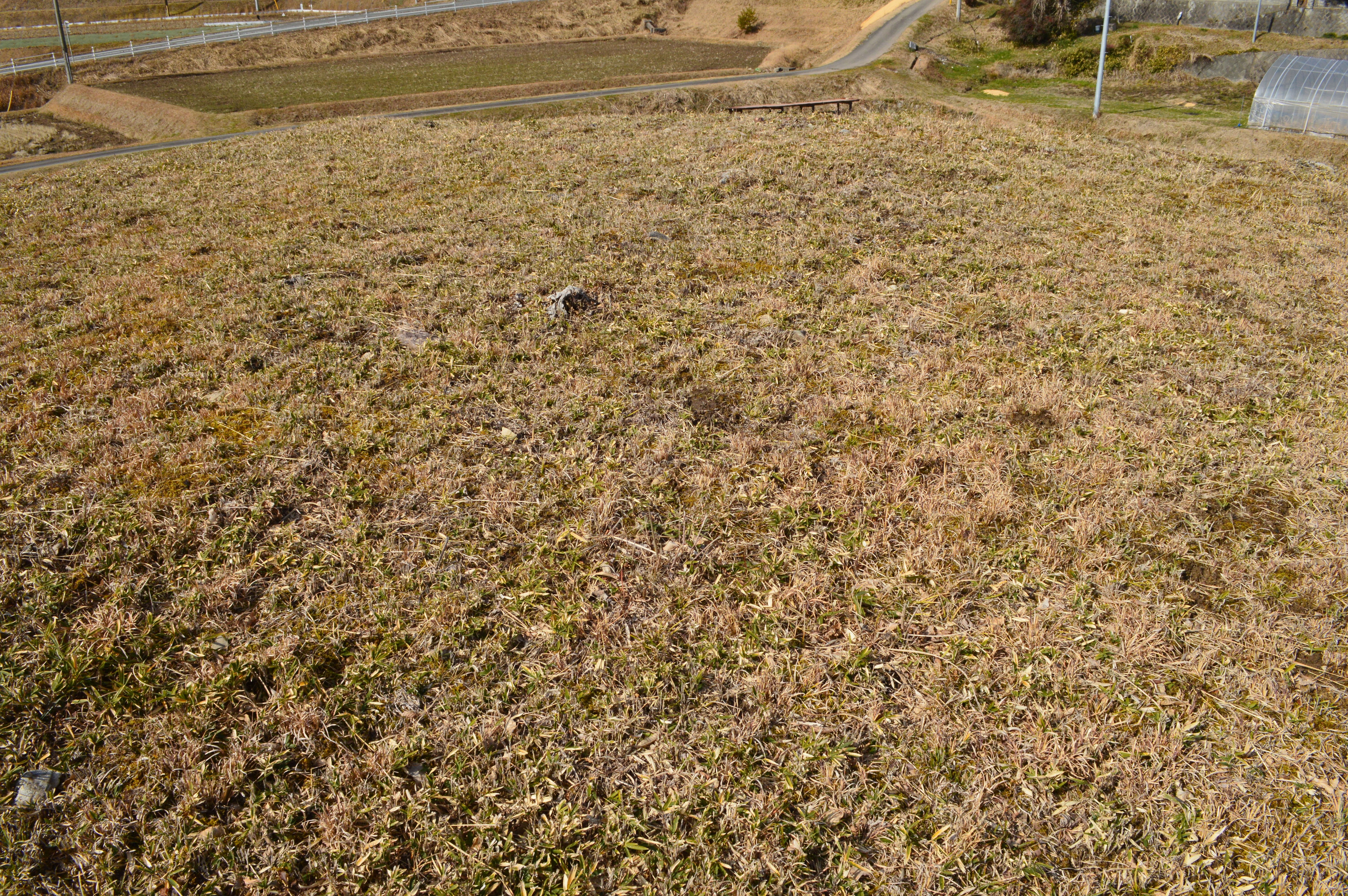 糸井大塚古墳 後円部墳頂 Nikon D3200